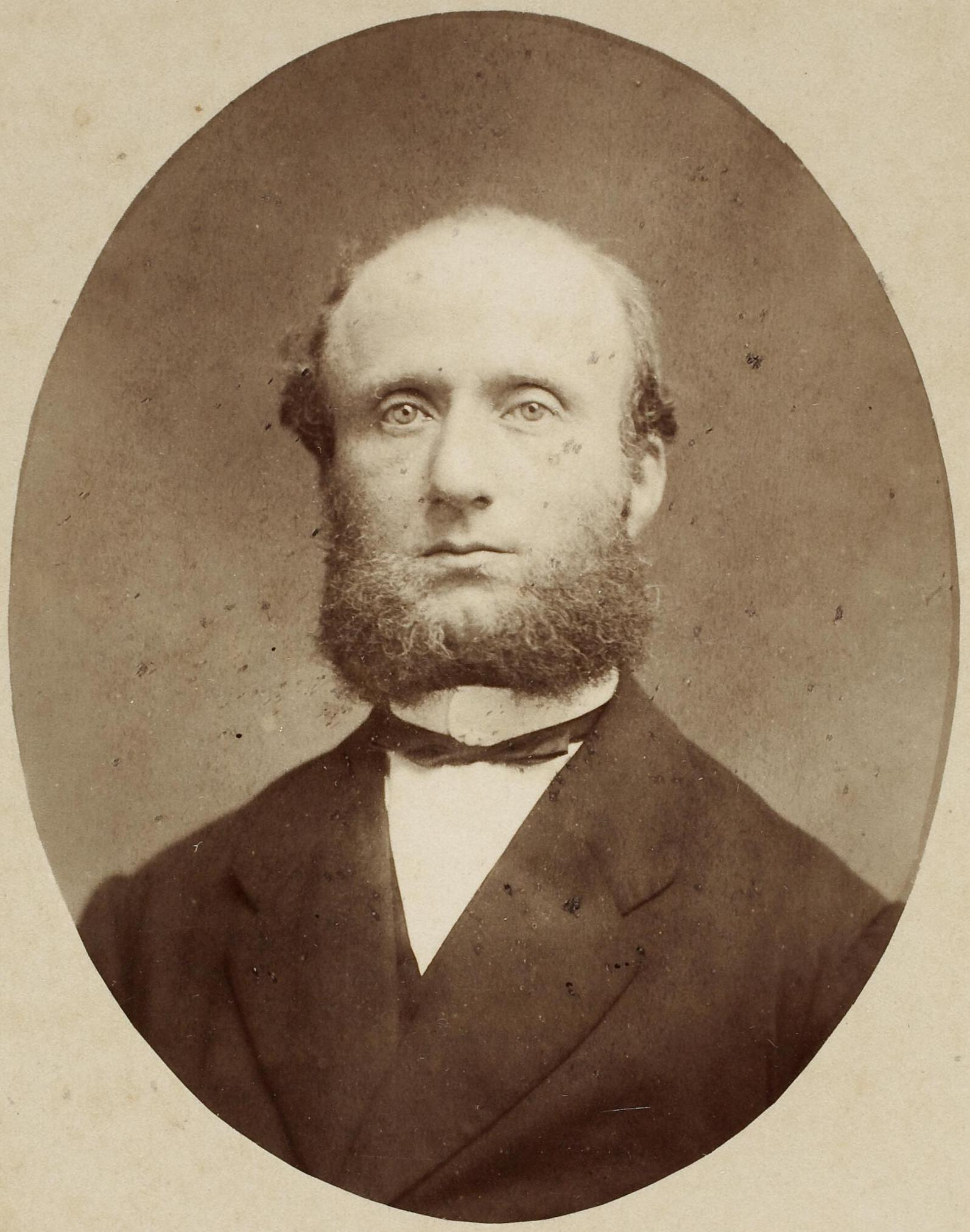 portret van Johannes Hermanus Gunning (1829-1905)